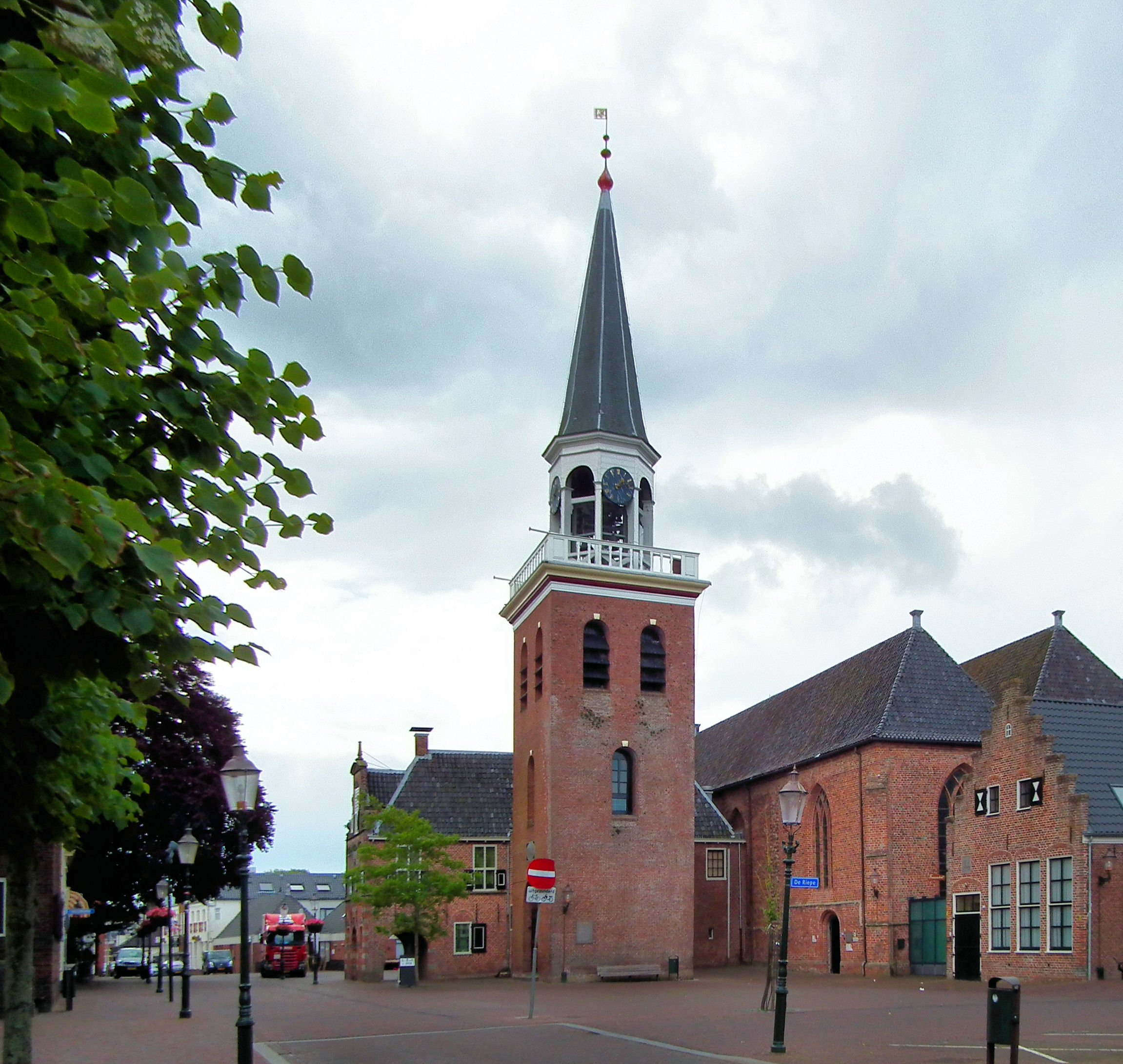 Het historische centrum van Appingedam (NL) - Nicolaikerk